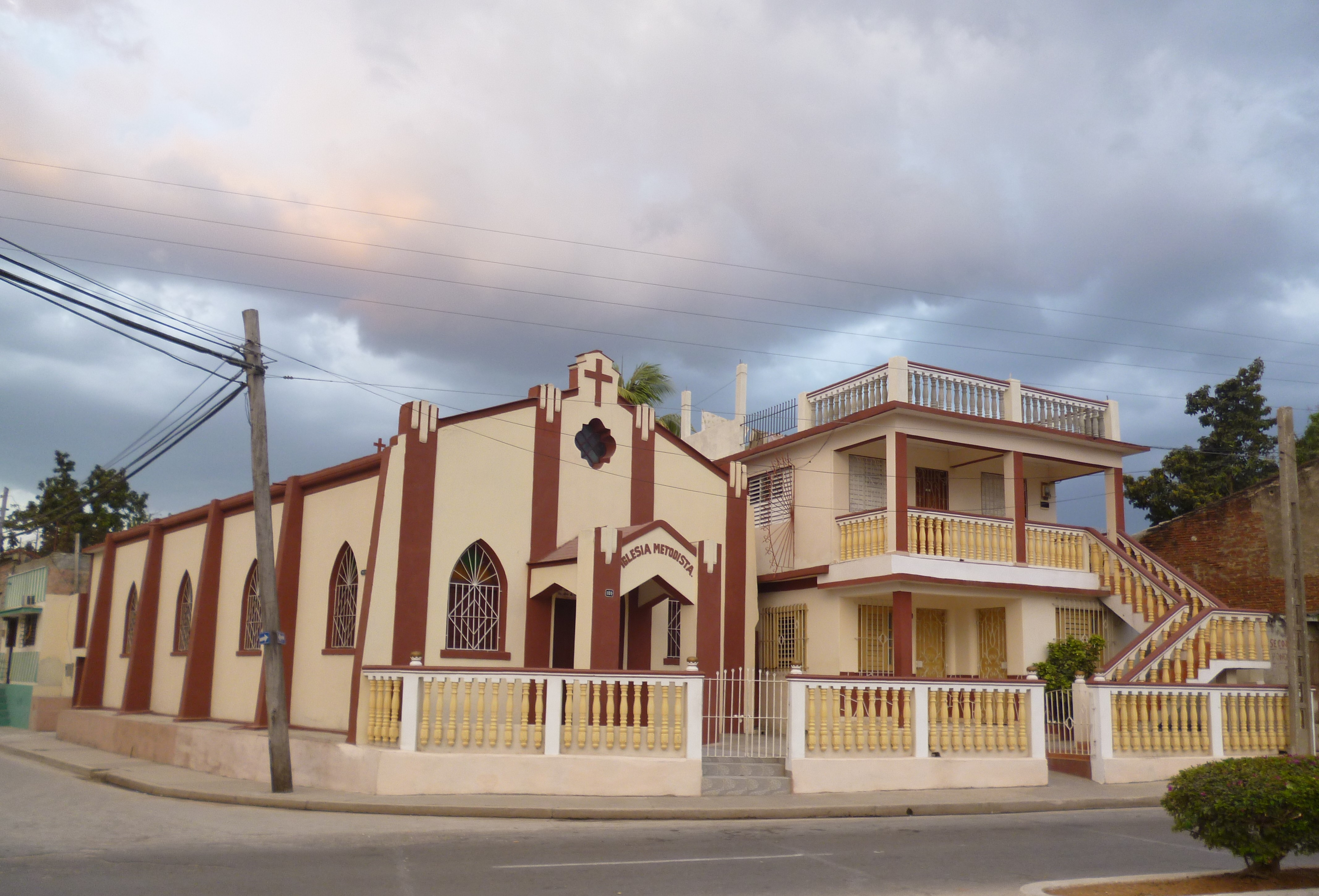 Datación del actual templo metodista (1953)